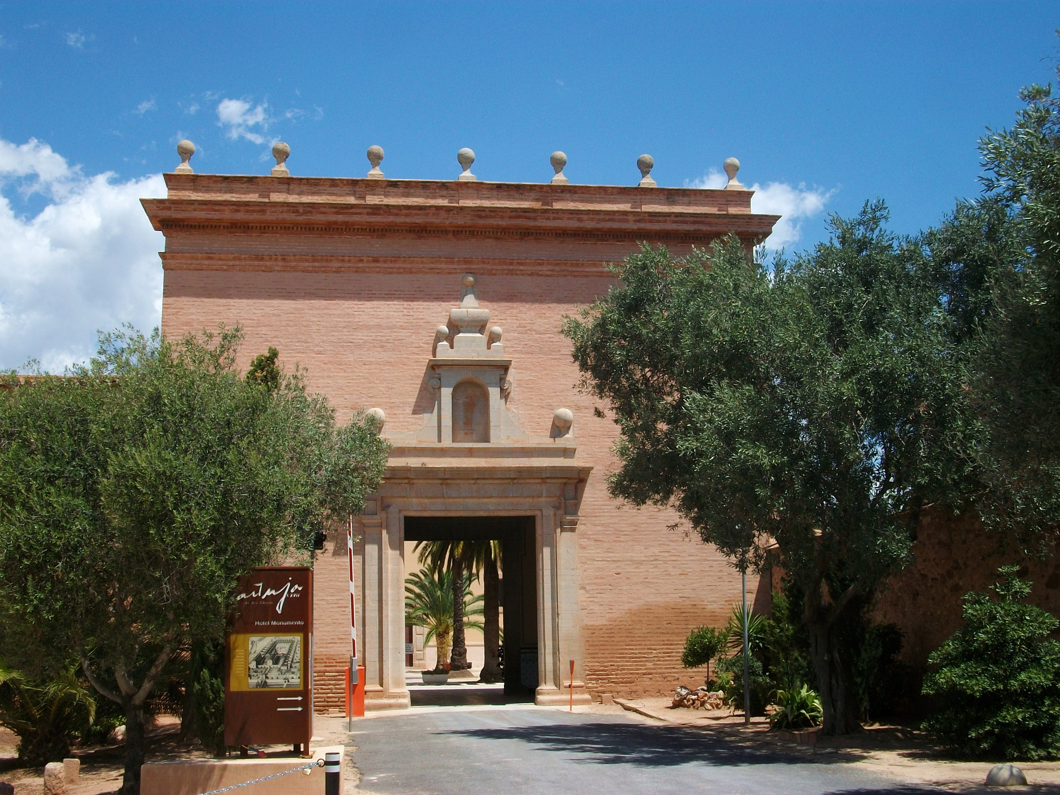 Porteria de la cartoixa d'Ara Christi, el Puig.